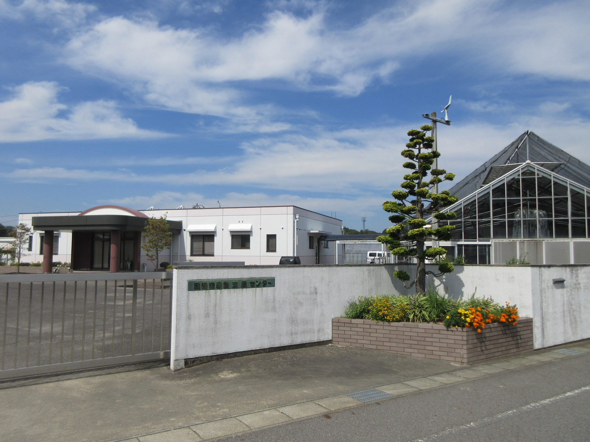 岡崎市農業支援センター（岡崎市東阿知和町）